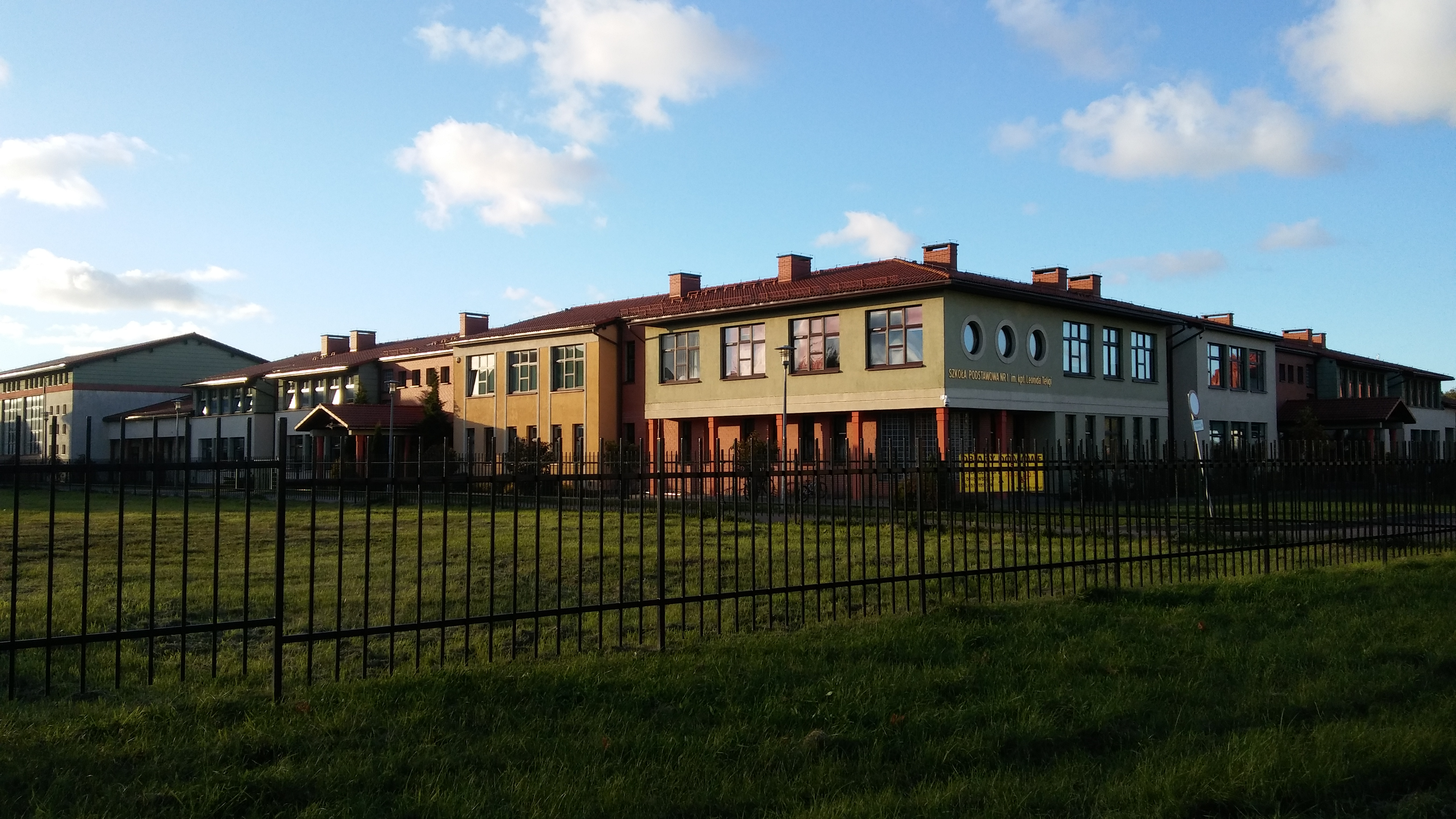 POL Ustka, ul. Darłowska- szkoła